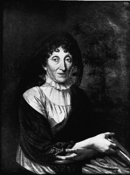 Maria Anna Wilhelmine von und zu Westerholt-Gysenberg als alte Frau